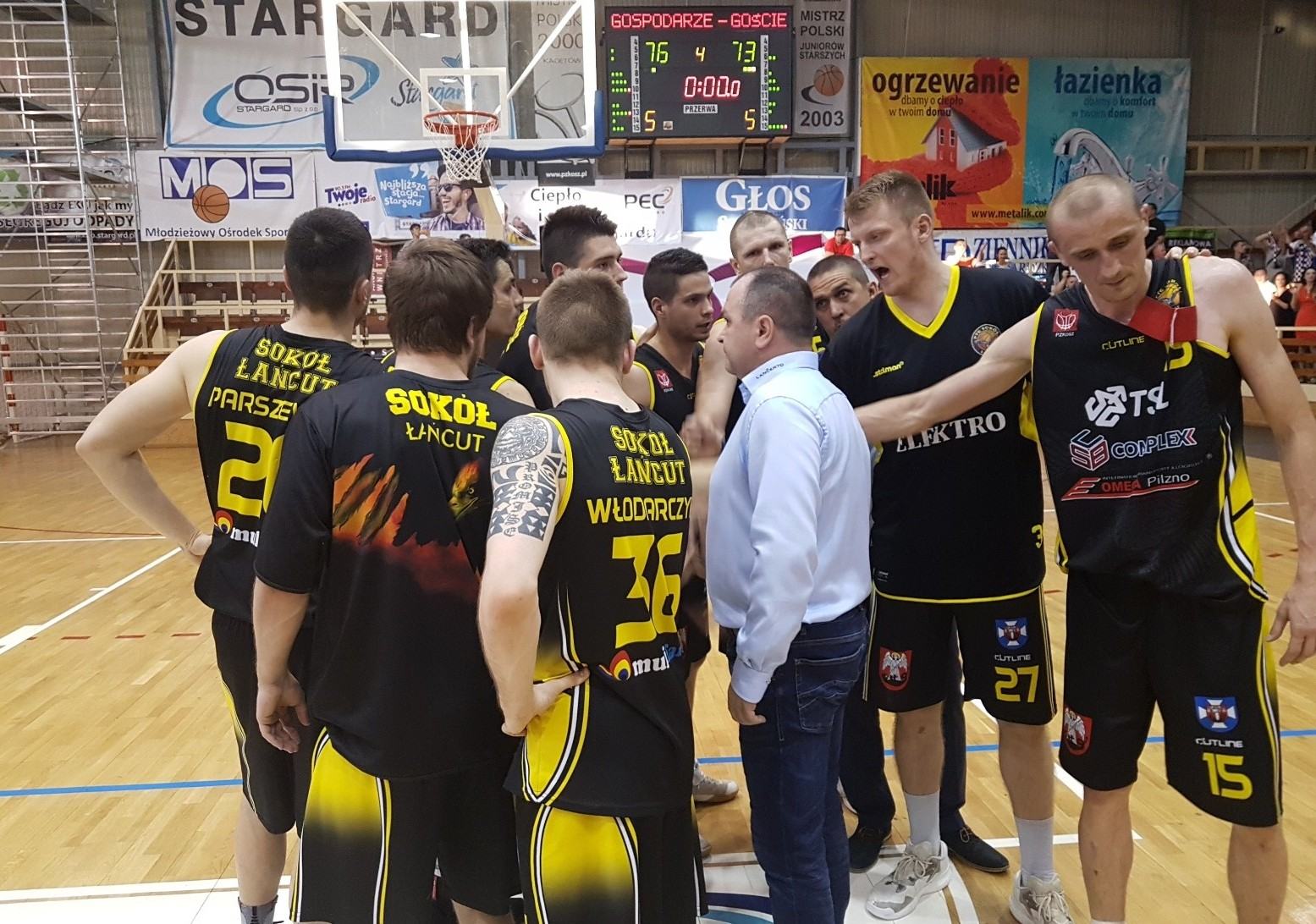 Zawodnicy Sokoła Łańcut po meczu (12.05.2018)